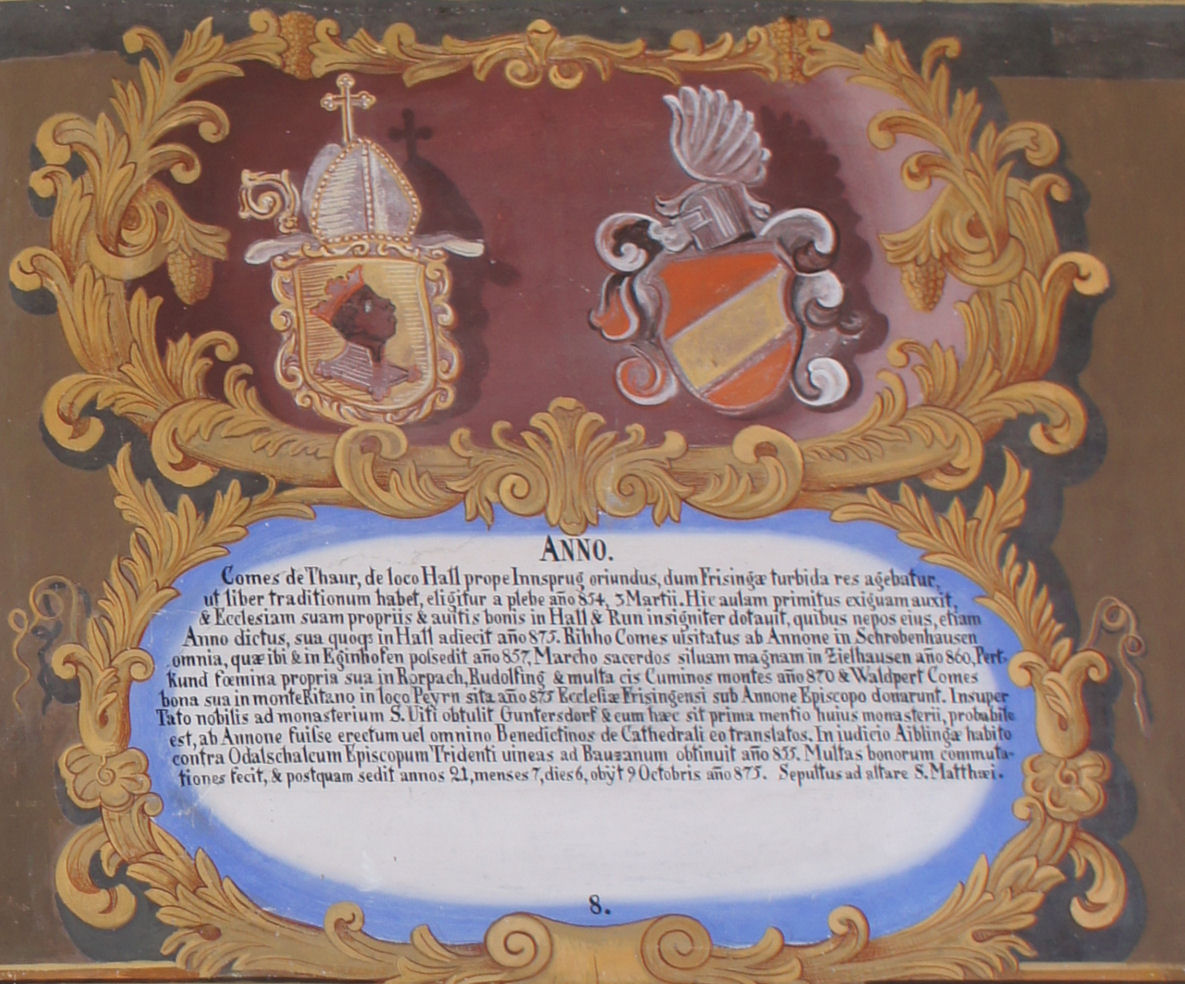 Wappentafel von Anno, Bischof von Freising, im Fürstengang zwischen Fürstbischöflicher Residenz und Freisinger Dom. Links das geistliche, rechts das persönliche Wappen, darunter ein lateinischer Text mit kurzer Biographie.